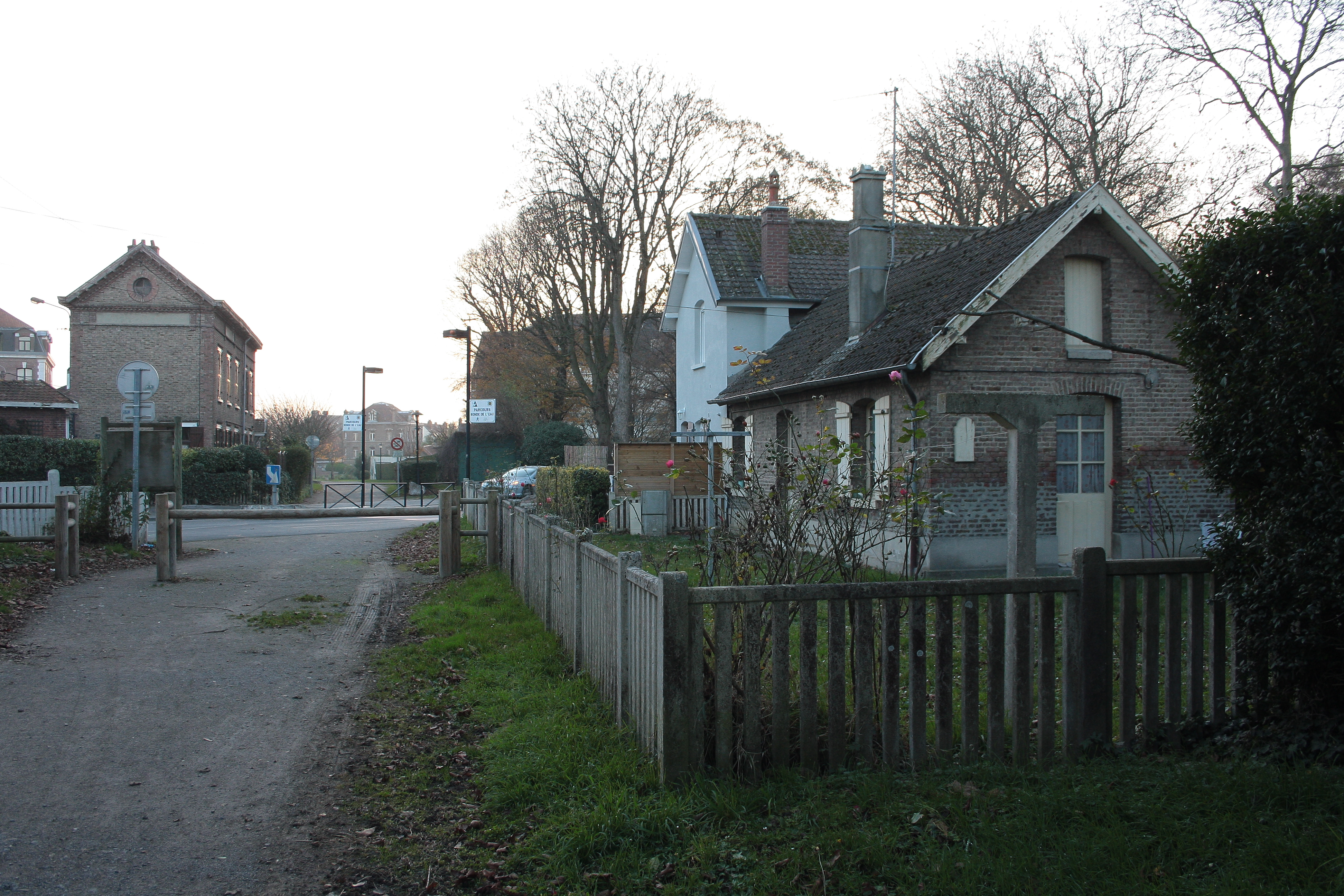 Anciens bâtiments voyageurs de la halte (Chemins de fer départementaux de la Somme) - au premier plan, à droite - et de la gare (Compagnie des chemins de fer du Nord, puis SNCF) - à l'arrière-plan, à gauche - d'Abbeville-Porte-du-Bois, transformés en habitations privées.